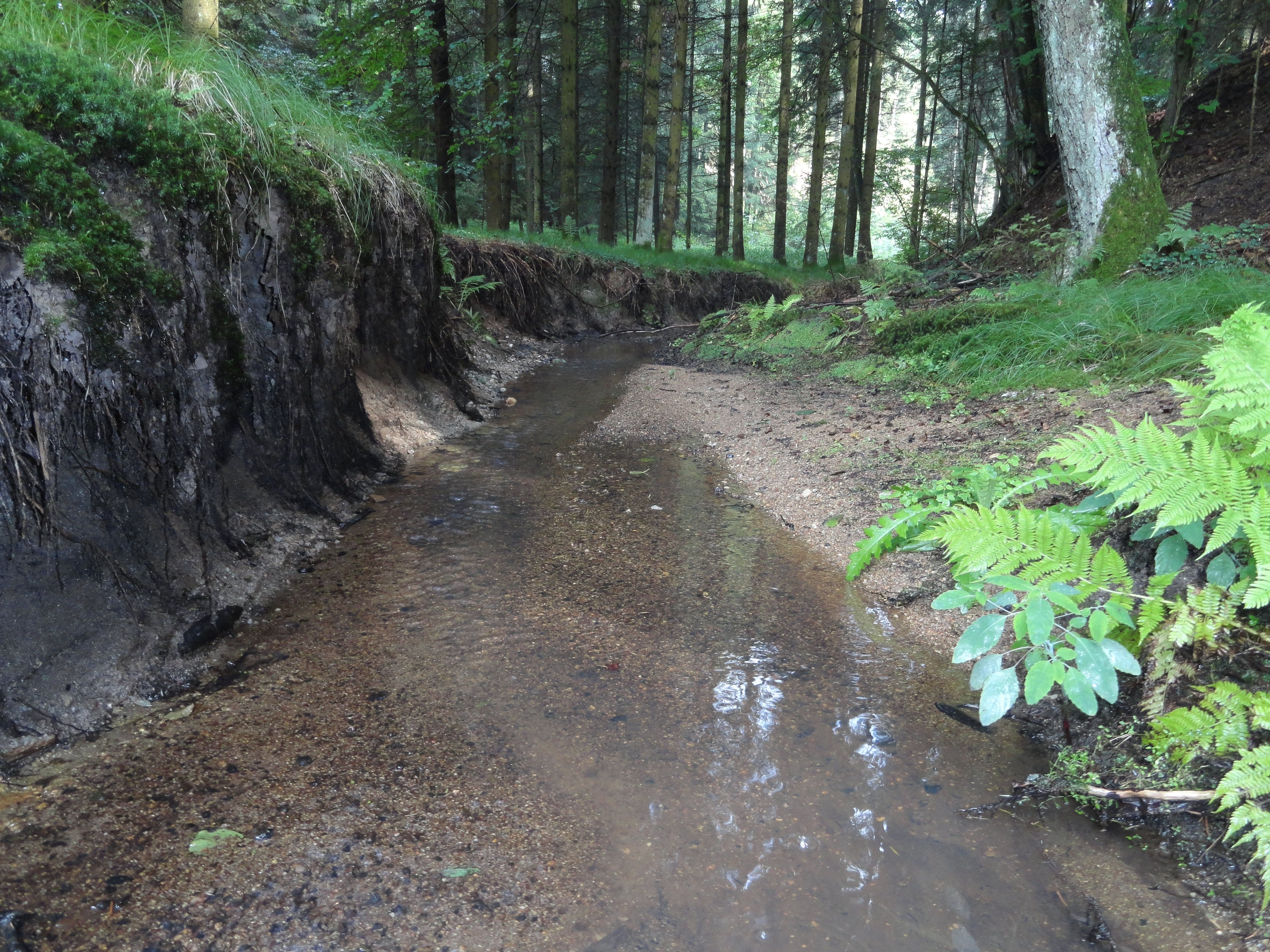 Waldgraben an der Gemeindegrenze zwischen Mitterfels und Haselbach